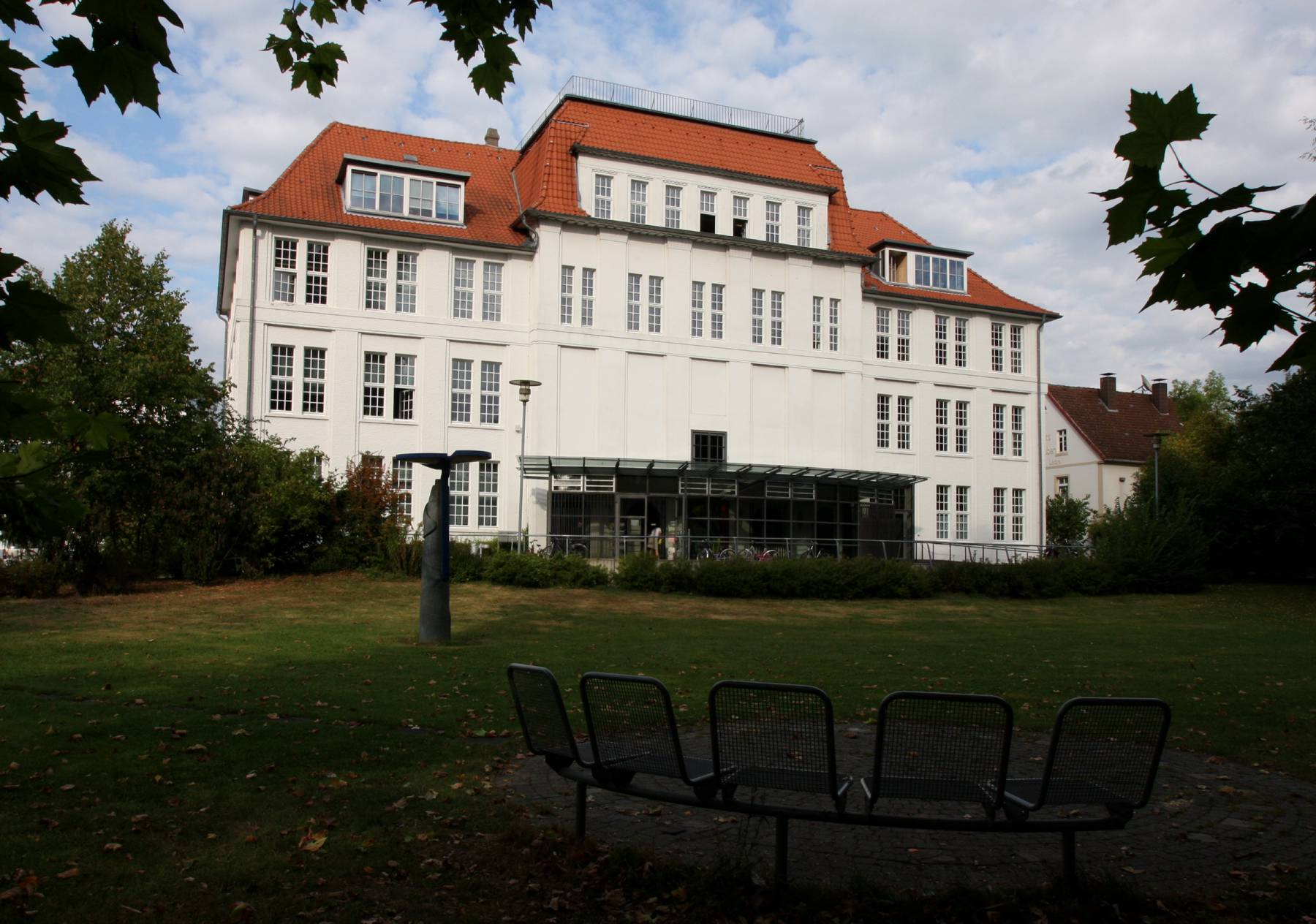 Das Foto zeigt das "Technikum" in Lage (Lippe), heute als Musikschule und von der Volkshochschule genutzt, war es bis Anfang der 1970er Jahre eine der bedeutendsten Ingenieursschulen im Land.